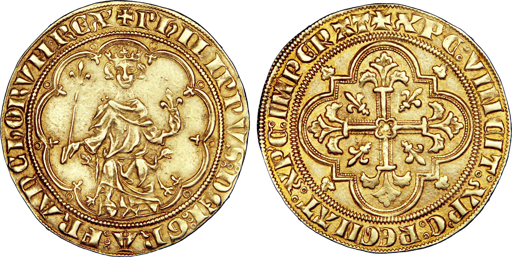 Métal : or Diamètre : 31,5mm Axe des coins : 8h. Poids : 7,04g. Titulature avers : + PhILIPPVS: DEI: GRA: FRAnChORVM: REX, (ponctuation par trois annelets superposés). Description avers : Philippe IV assis de face, couronné, tenant le sceptre de sa main droite et un lis de sa main gauche, dans un polylobe tréflé ; le polylobe est cantonné d’annelets. Traduction avers : (Philippe, par la grâce de Dieu, roi des Francs). Titulature revers : + XP’C: VINCIT: XP’C: REGNAT: XP’C: IMPERAT, (ponctuation par deux annelets superposés). Description revers : Croix feuillue et fleurdelisée avec quadrilobe en cœur, cantonnée de quatre lis, dans un quadrilobe aux quatre angles extérieurs tréflés. Traduction revers : (Le Christ vainc, le Christ règne, le Christ commande).